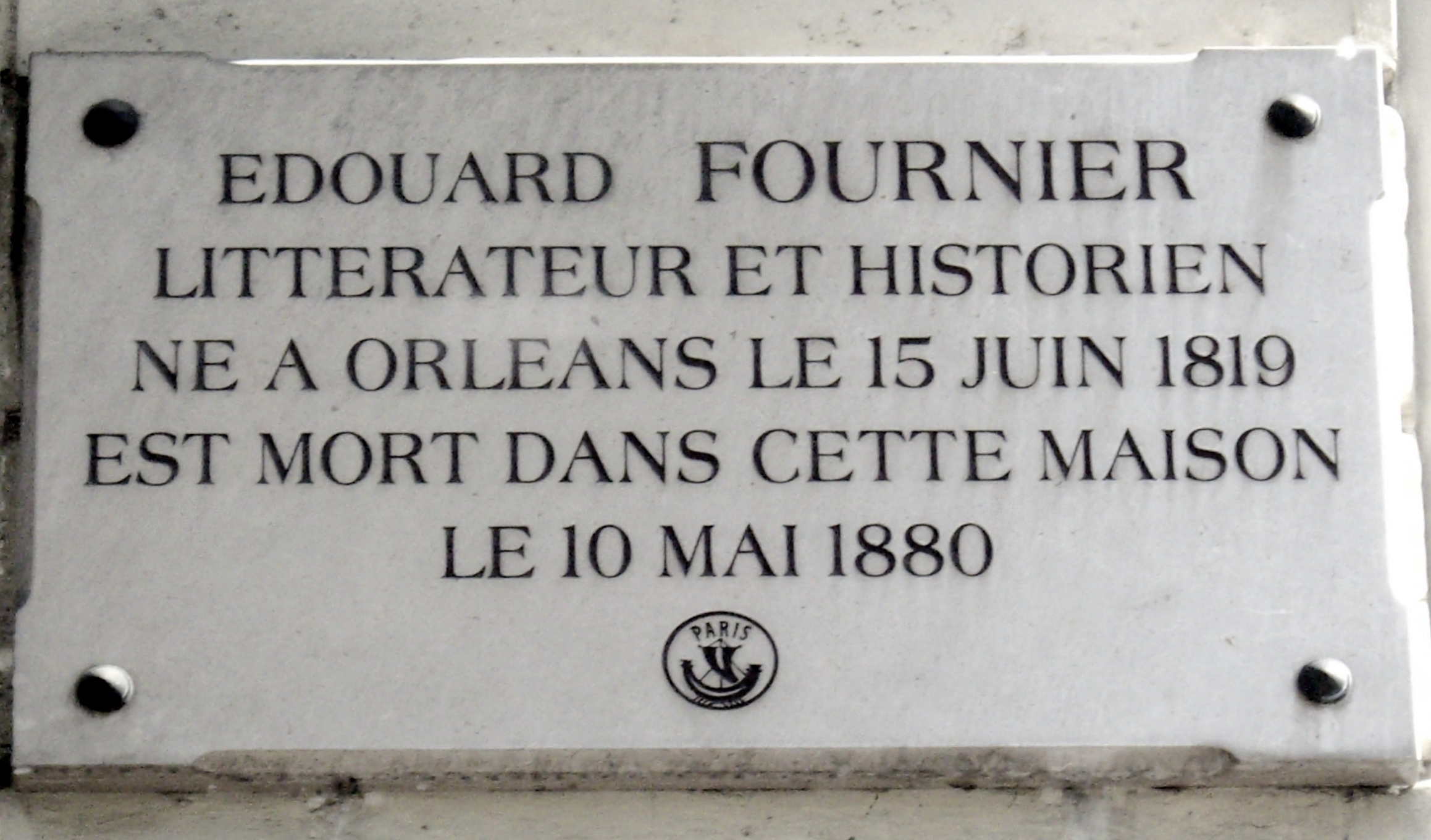 Plaque apposée au n° 13 de la rue des Saints-Pères, Paris 6e, où mourut l'historien et homme de lettres Édouard Fournier (1819-1880) le 10 mai 1880.